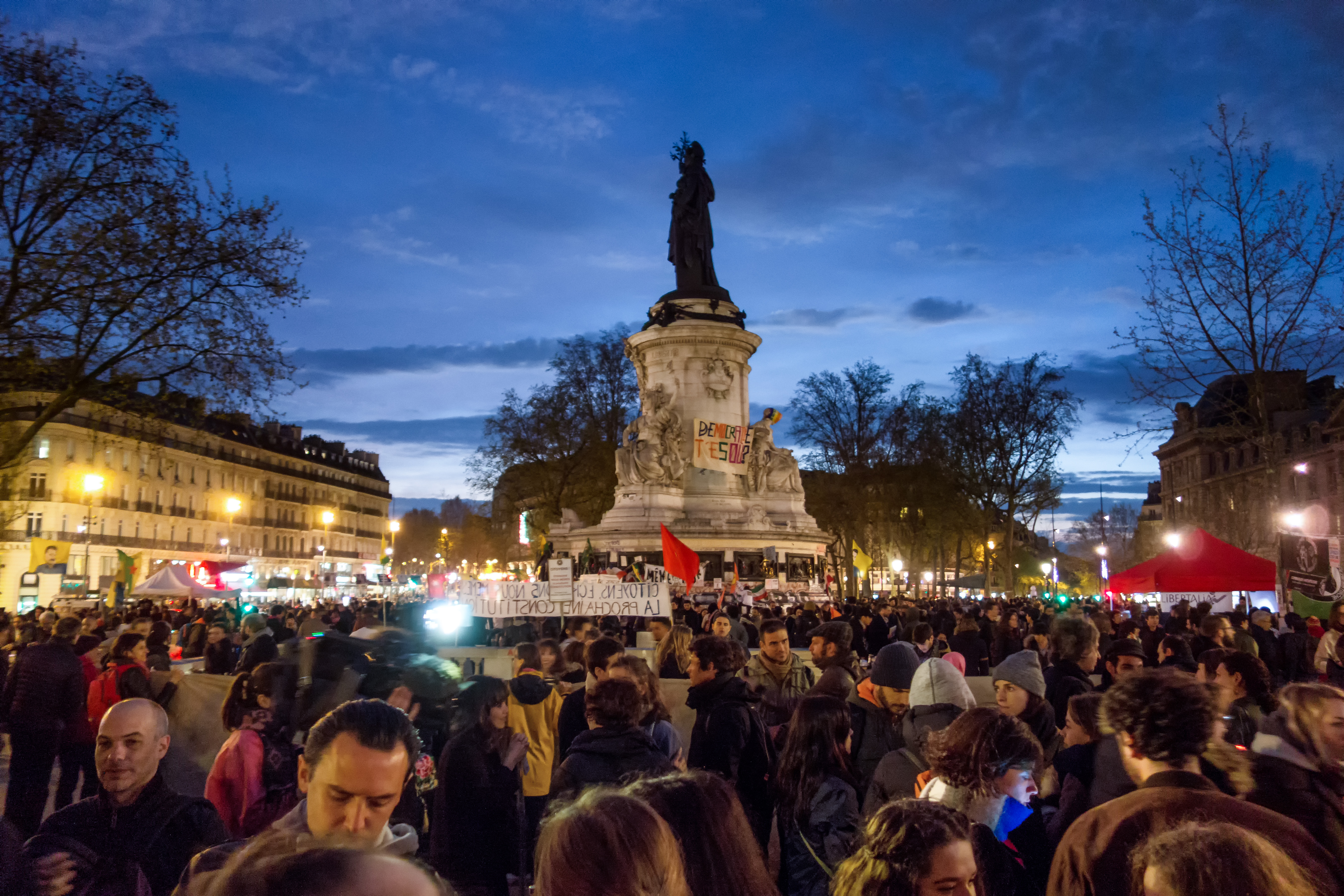 Rassemblement "Nuit Debout" à Paris 41 mars.